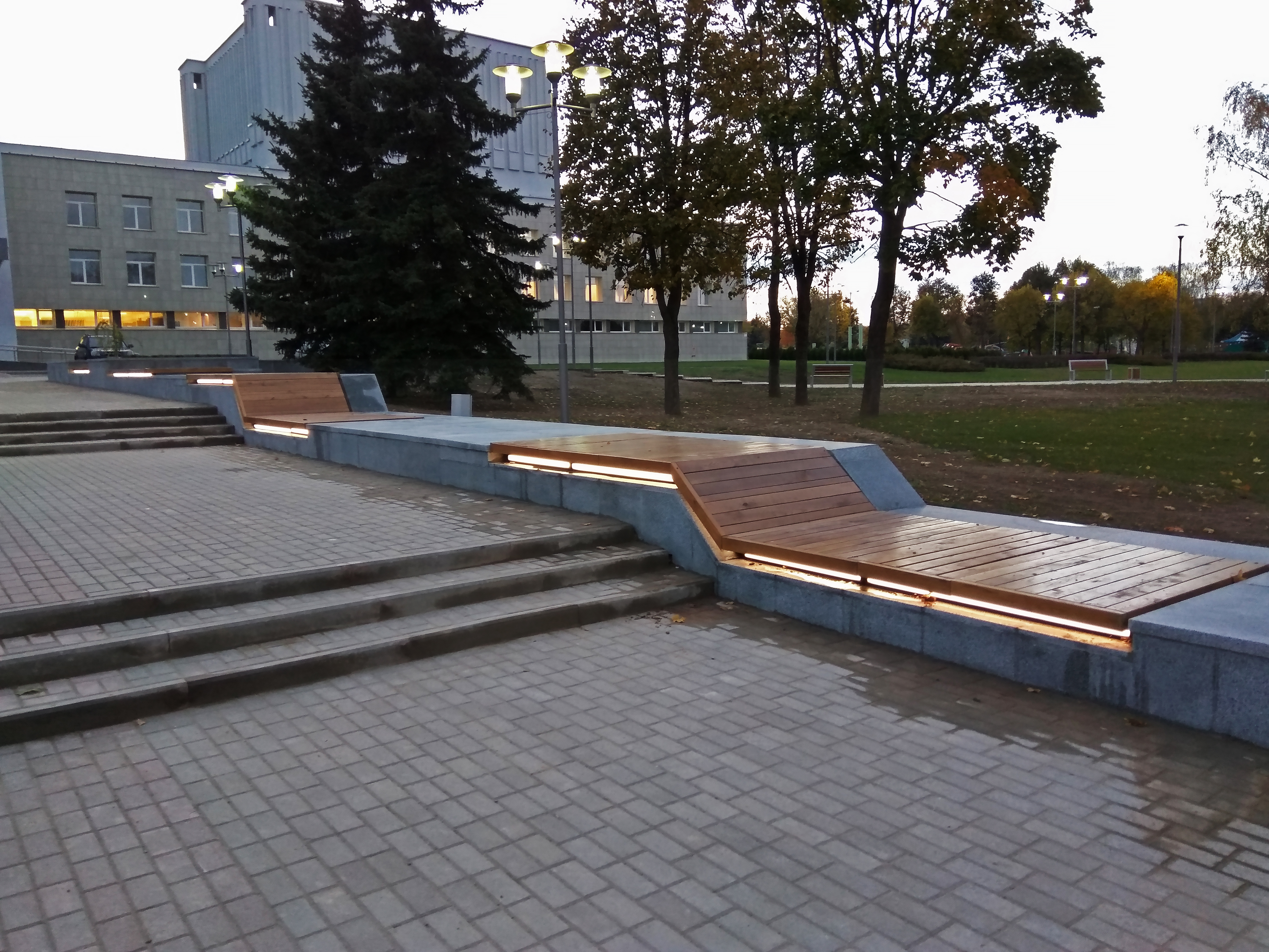 Магілёў. Задняпроўскі сквер пасля рэканструкцыі